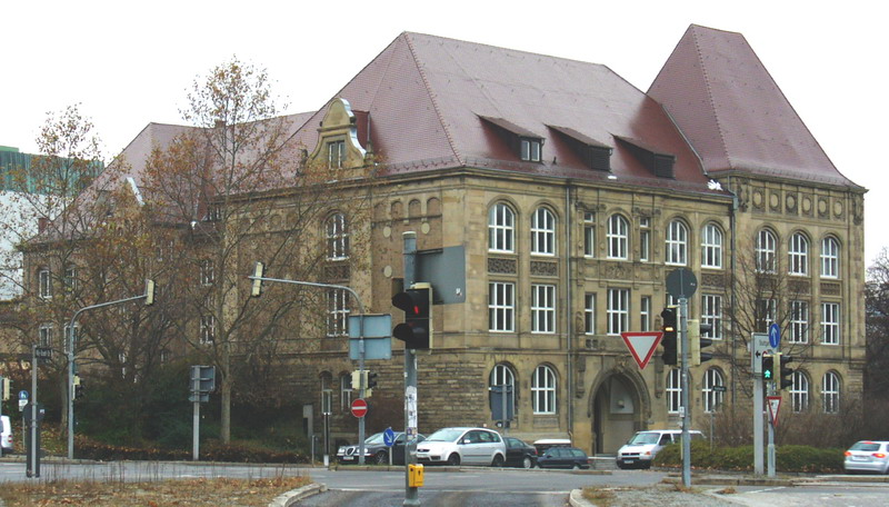 Stuttgart Koenigin-Katharina-Stift